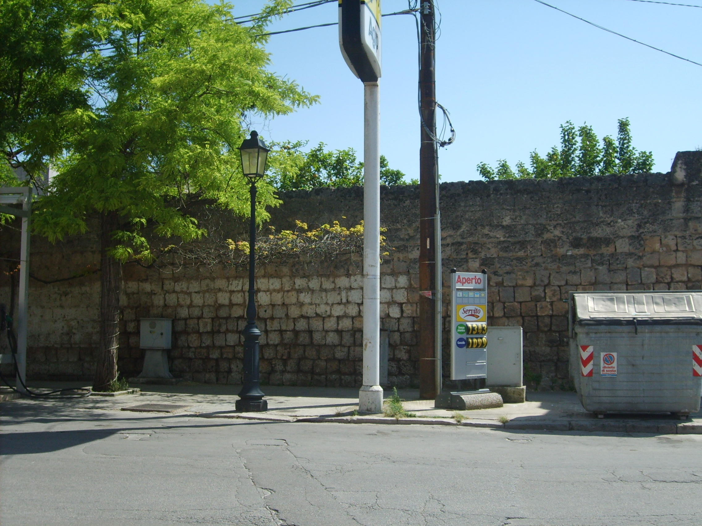 Mura urbiche